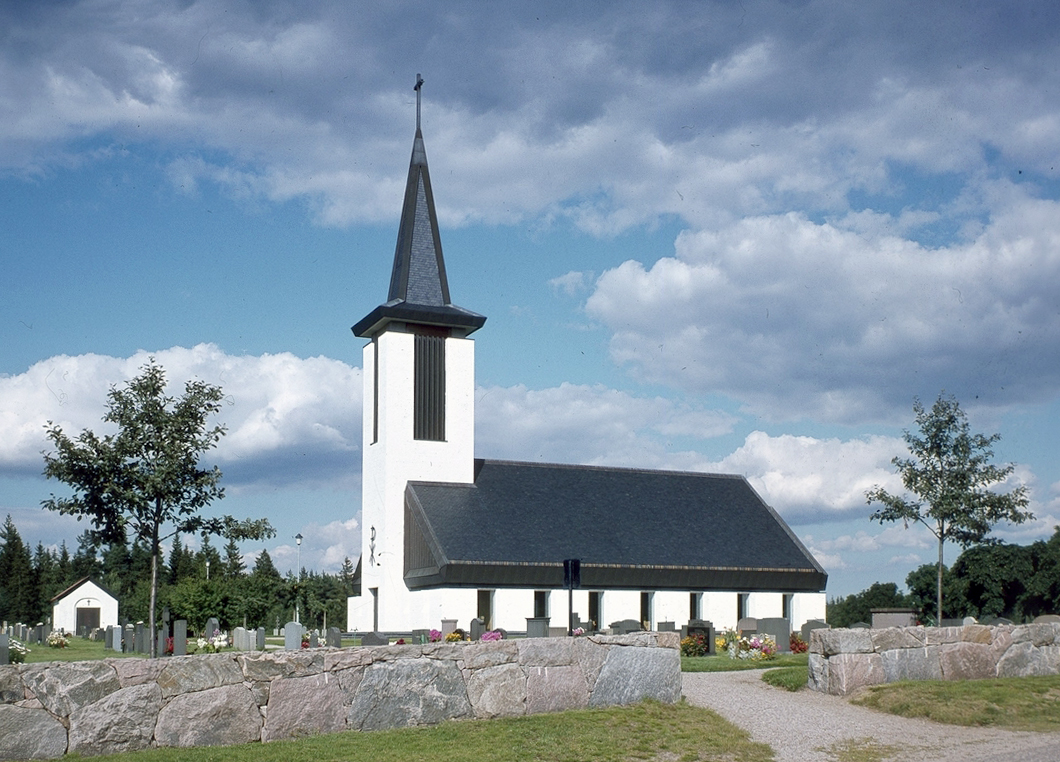 Dalstorps kyrka